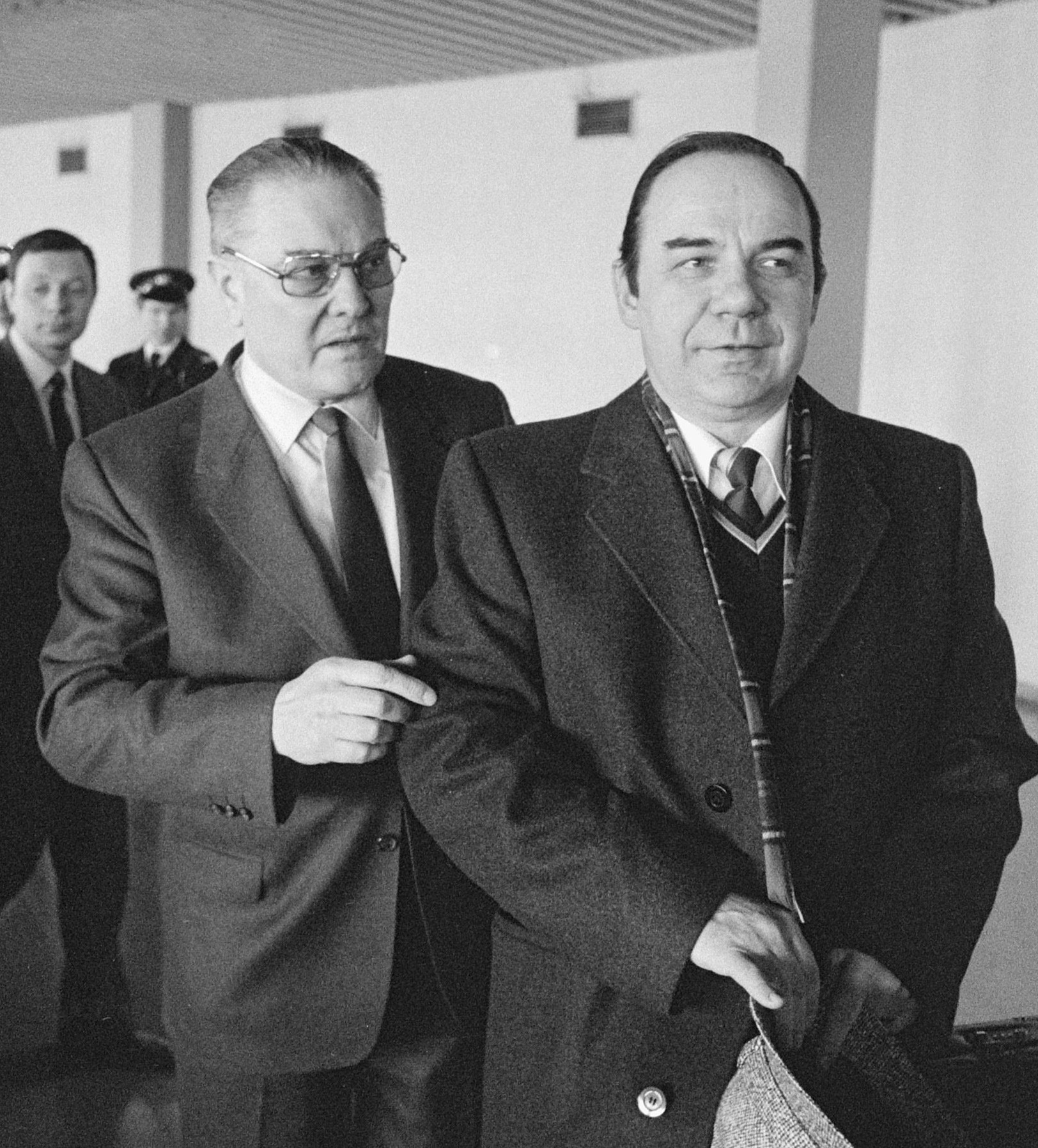 Zoon Russische minister van BuiZa Gromyko bezoekt land; Gromyko jr. (l) werd afgehaald door Russische amb. in ons land Beletsky